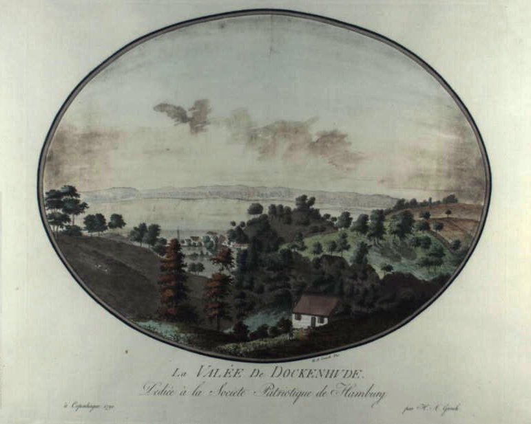 Heinrich August Grosch: La Valée de Dockenhude ... de Hamburg. Kobberstikk, kolorert. Tilhører Det Kongelige Bibliotek